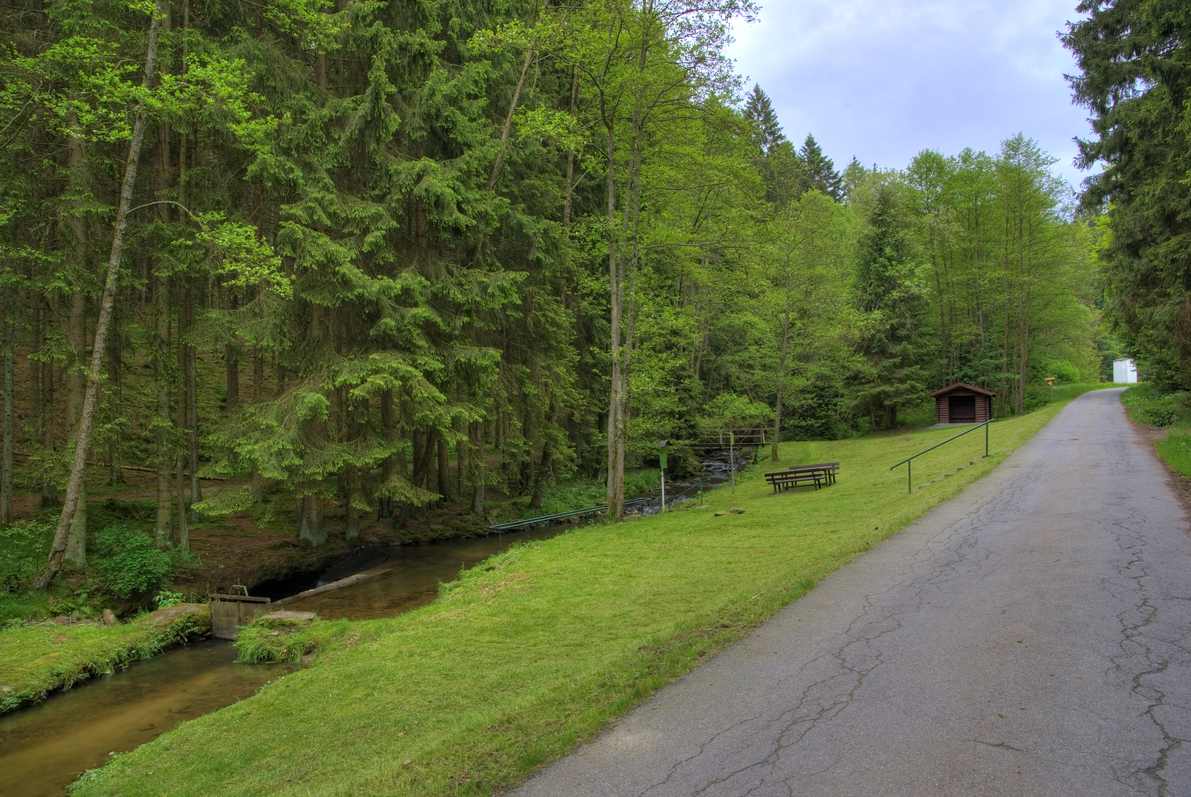 Kneippbecken bei Viechtach, unterer Distelberg